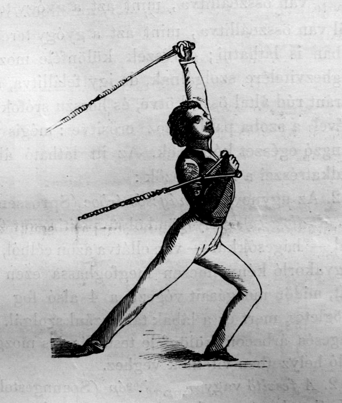 Tornász 1886-ban